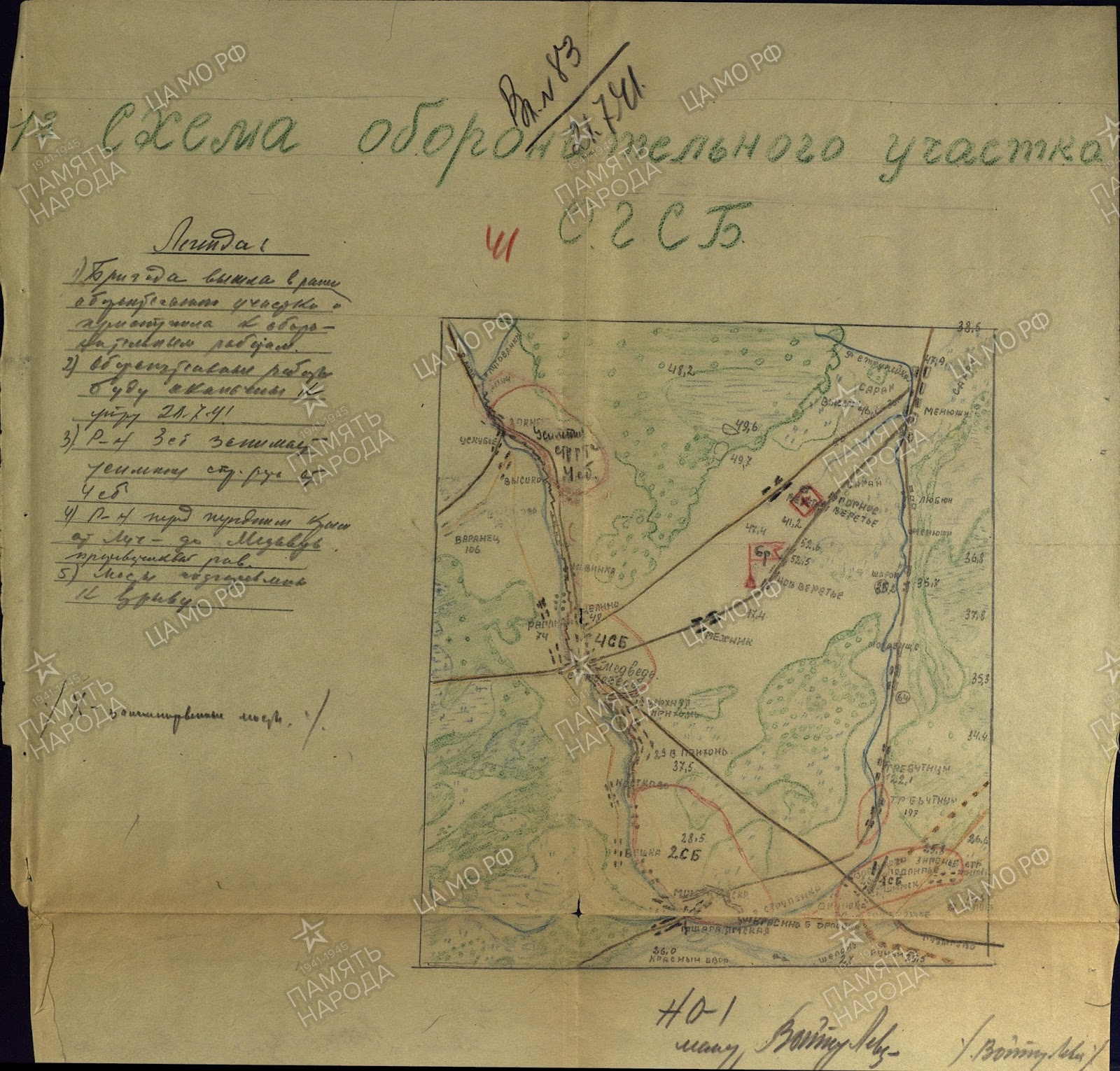 Схема